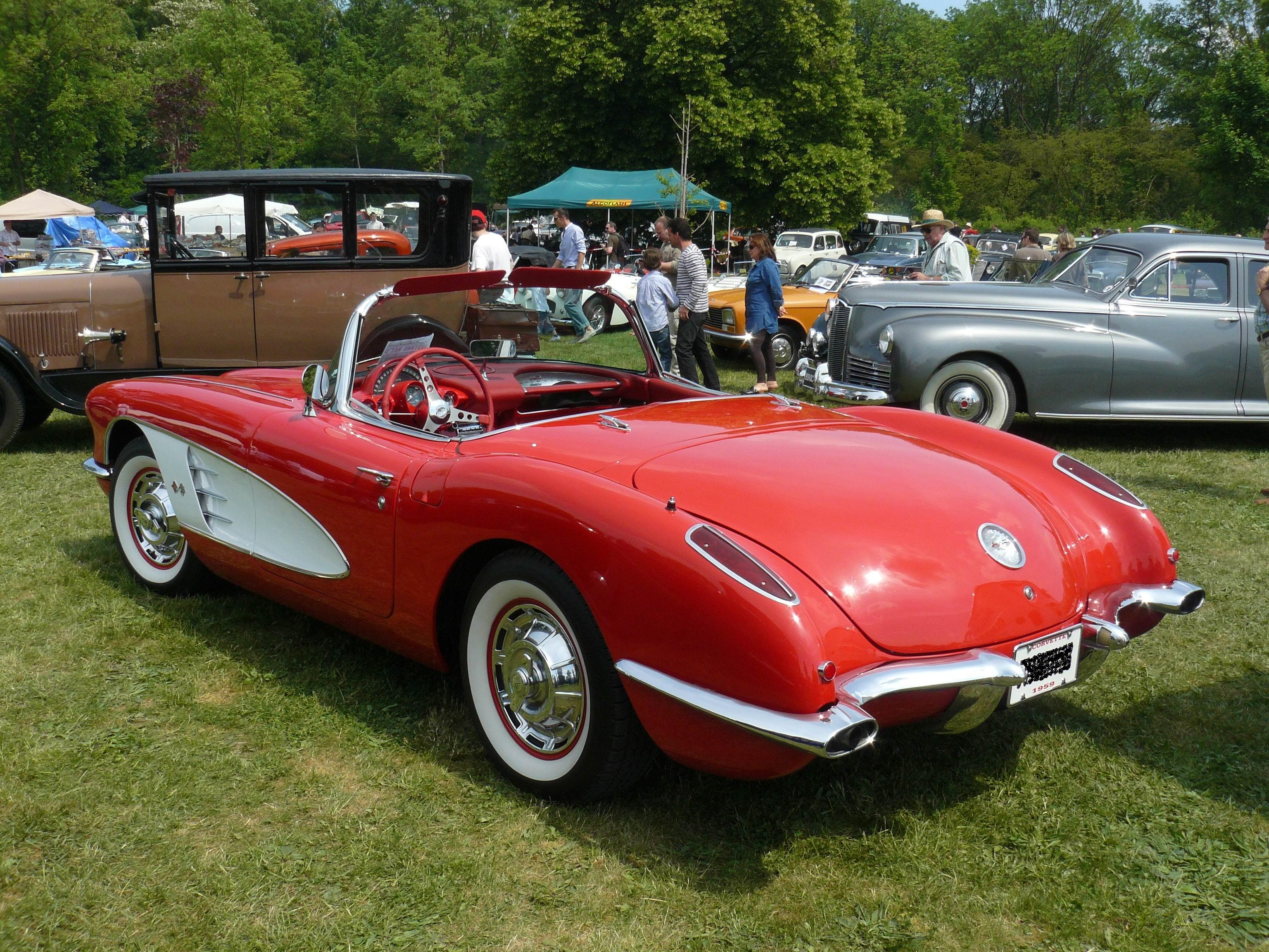 Jardinerie Laplace Mai 2011